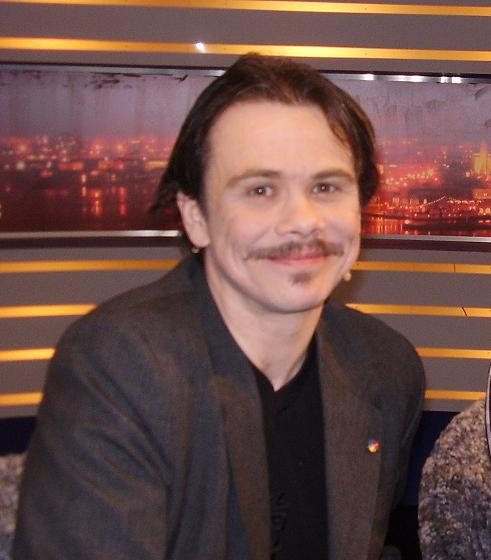 Lukas Romson